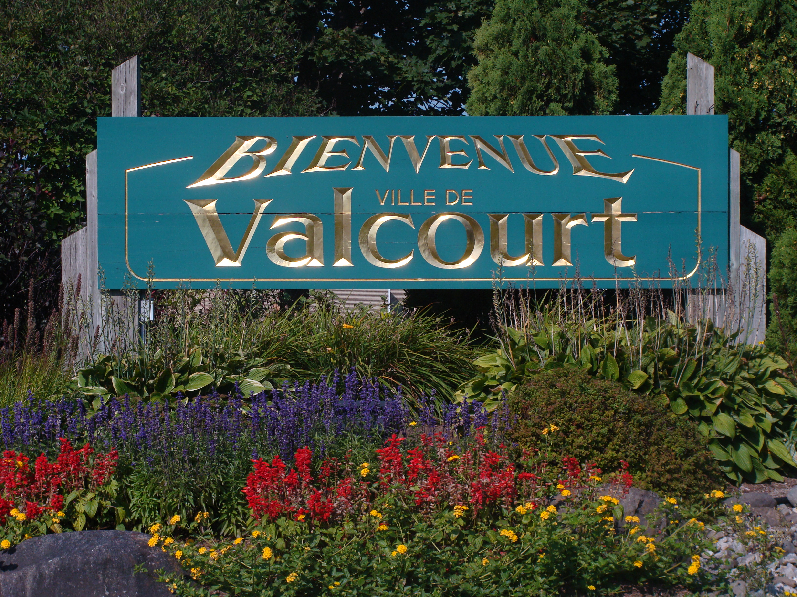 Aviso de bienvenida a Valcourt